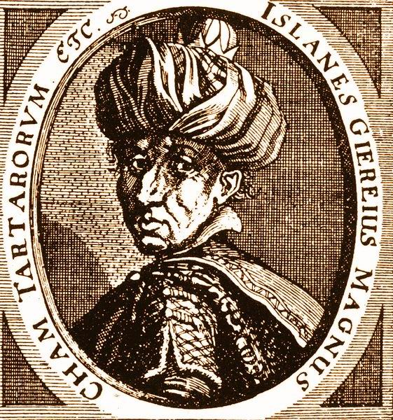 Іслам Гірей III